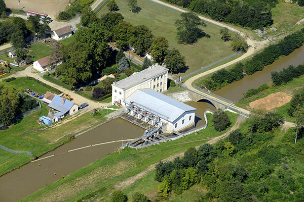 Ikervár légi fotó